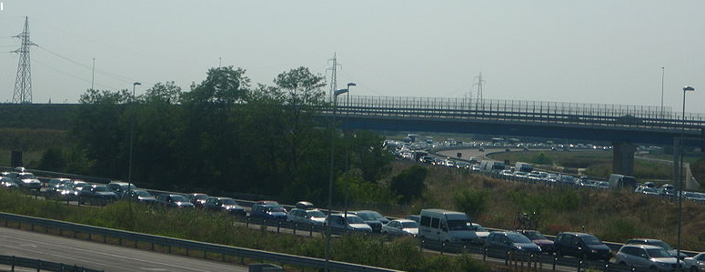 Code/queue/stau 1 agosto 2009